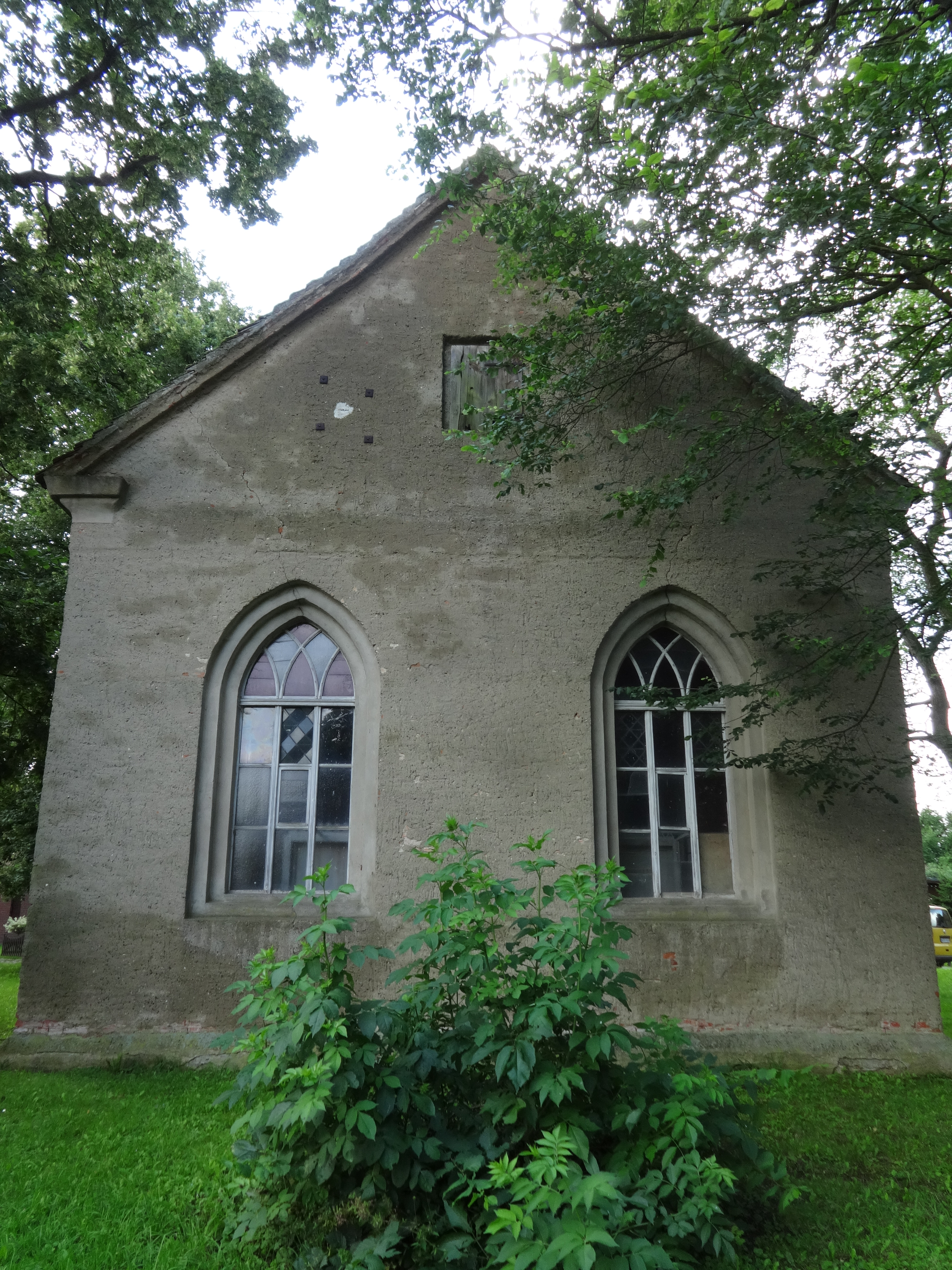 Die Kapelle in Rosenhagen in der Gemeinde Bugewitz entstand vermutlich im 17. Jahrhundert. Im Innern steht eine neugotische Ausstattung mit Kanzelaltar und verglaster Westempore.